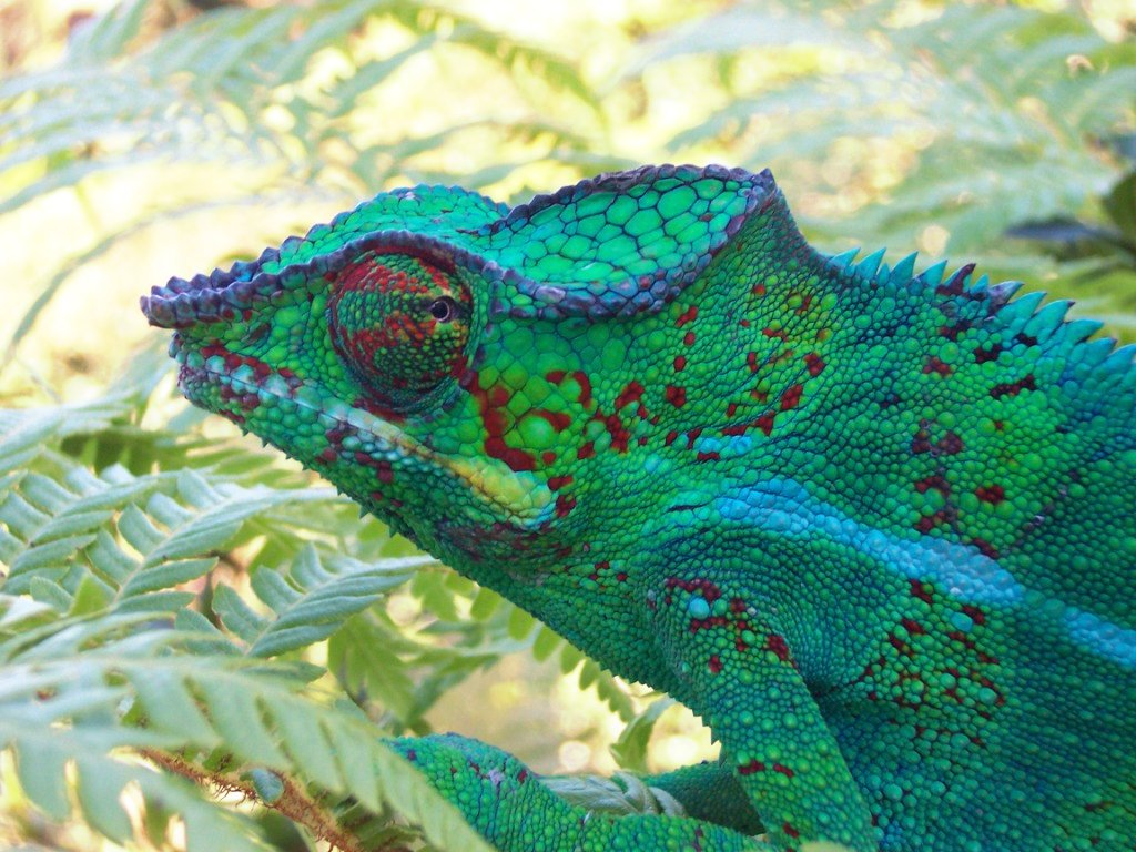 Furcifer pardalis Caméléon (mâle), Le Tampon, La Réunion